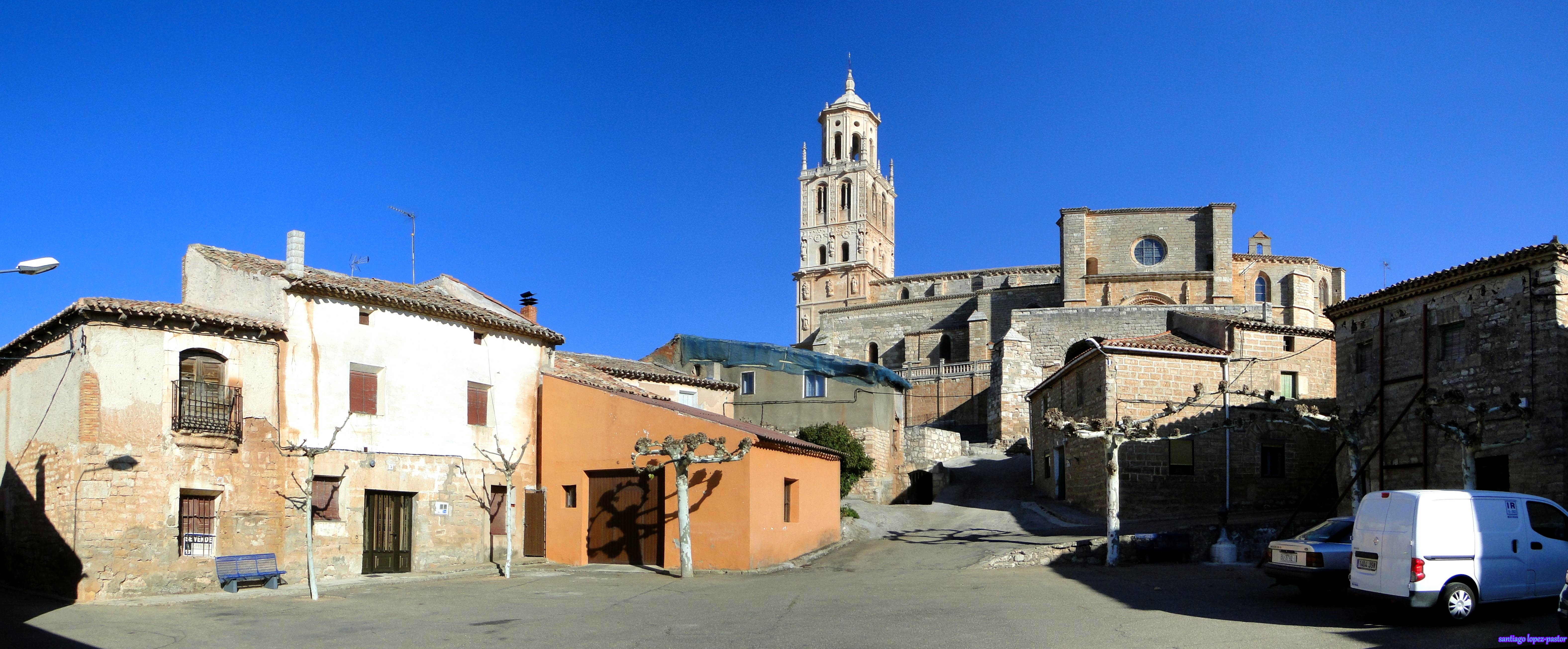 Santa María del Campo